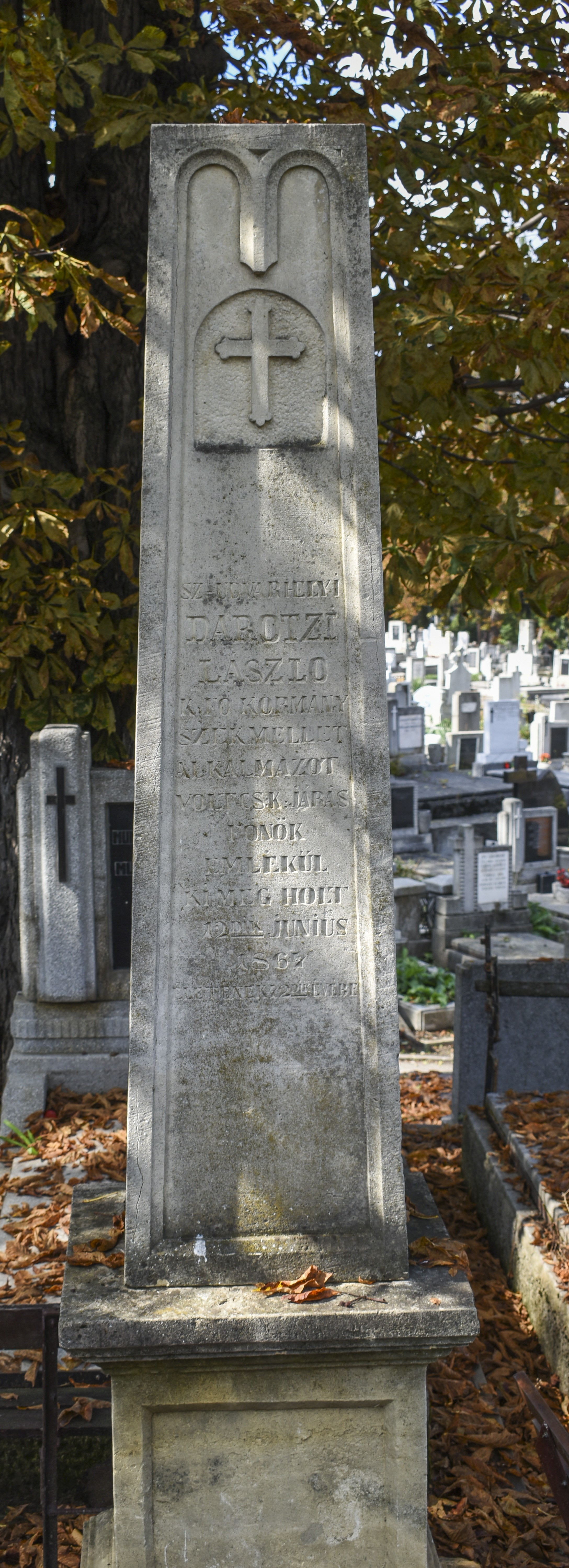 Mormânt Darótzi László (1822-1864) 209